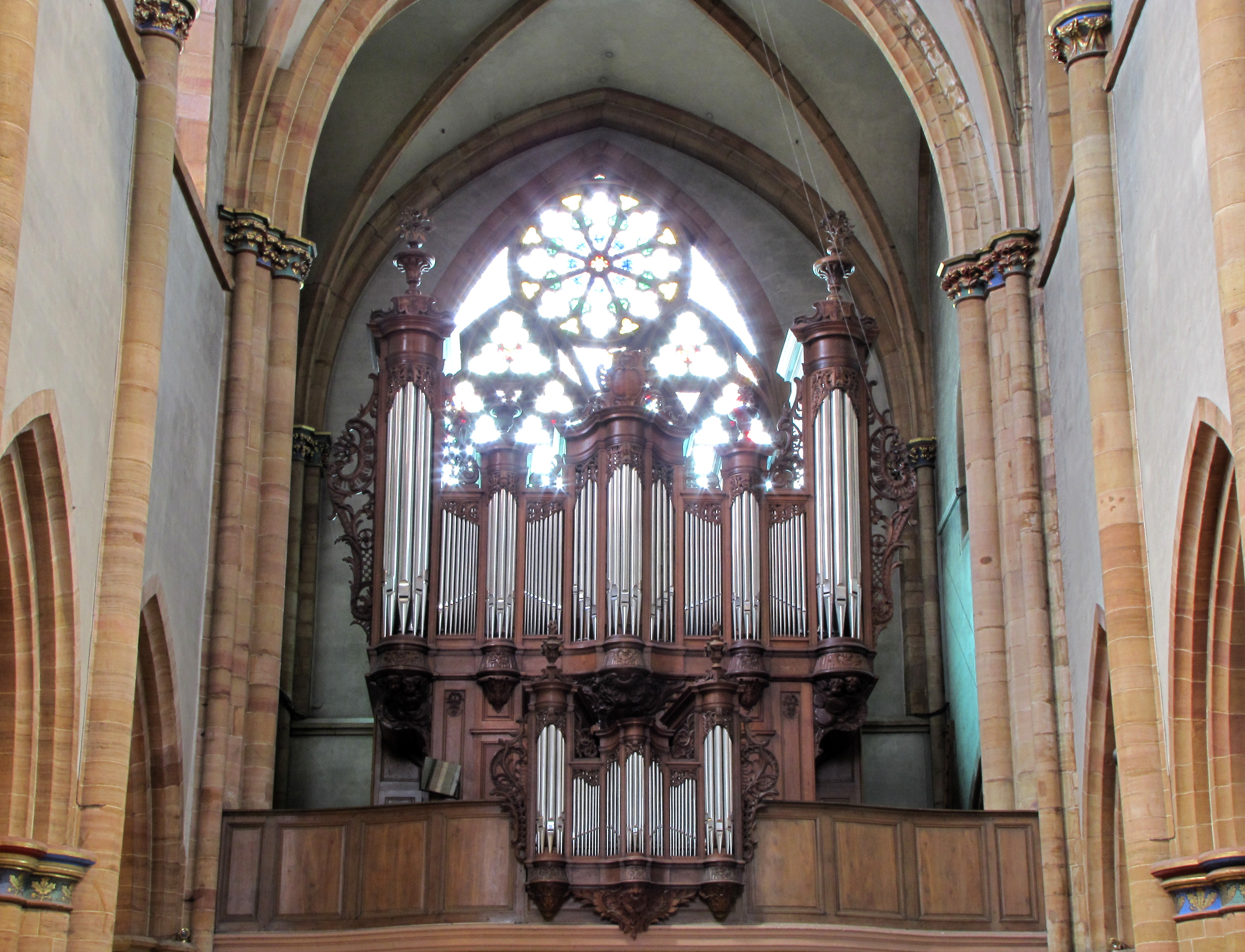 Alsace, Haut-Rhin, Ancienne collégiale Saint-Martin (XIIIe-XIVe-XVe) de Colmar (PA00085368): Orgue de tribune Richard Freitag (Orgelbau Felsberg, 1979).